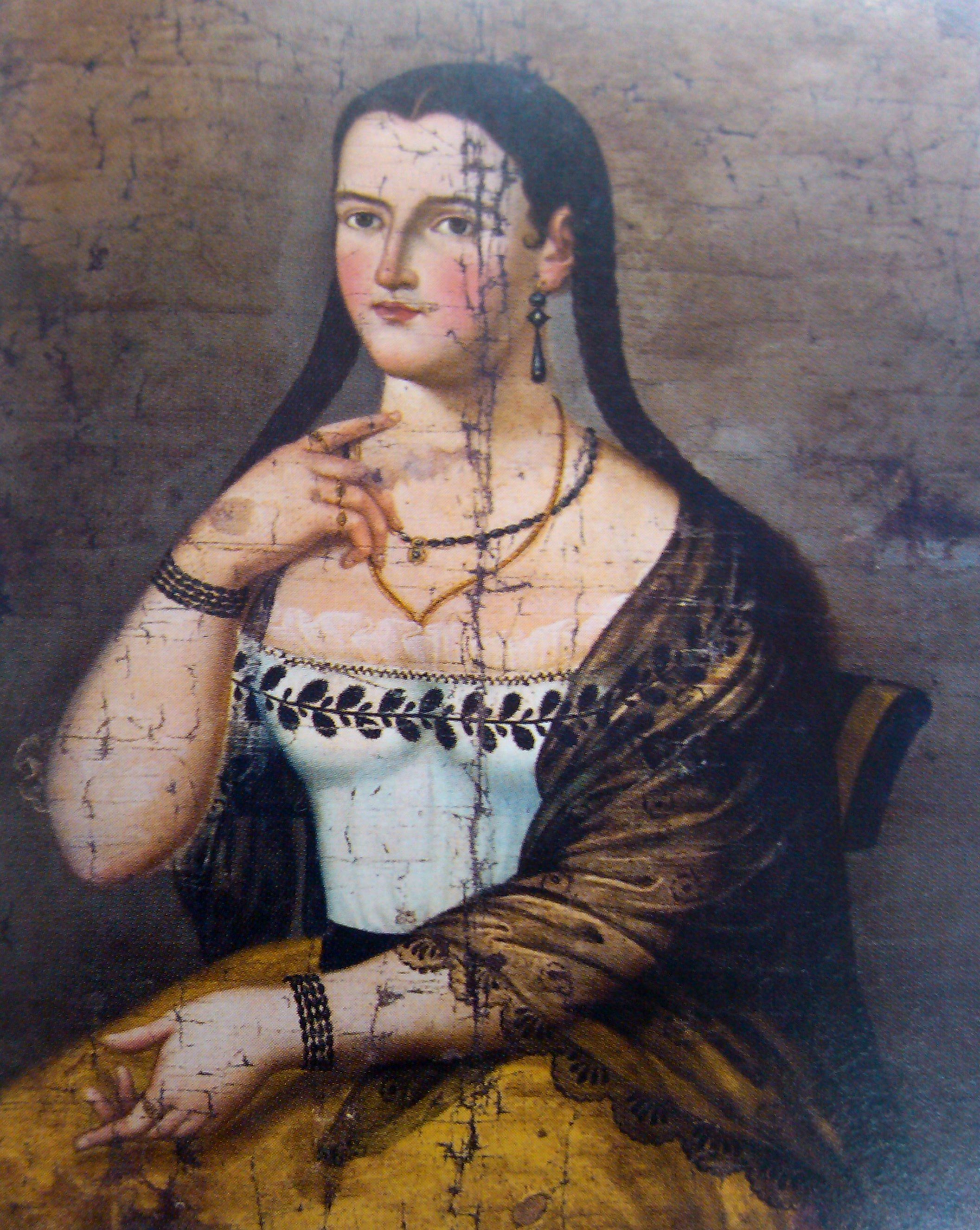 Manuela Cañizares, heroína independentista ecuatoriana. Trabajo del pintor Antonio Andrade, quien la retrató alrededor de 1799, cuando Manuela tenía 30 años. El cuadro reposa en el Museo Nacional de la Casa de la Cultura Ecuatoriana, de Quito.